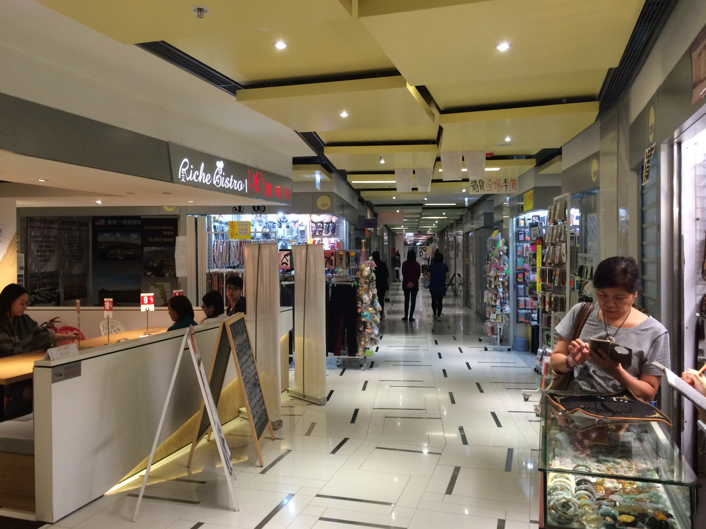 City Garden Basement_